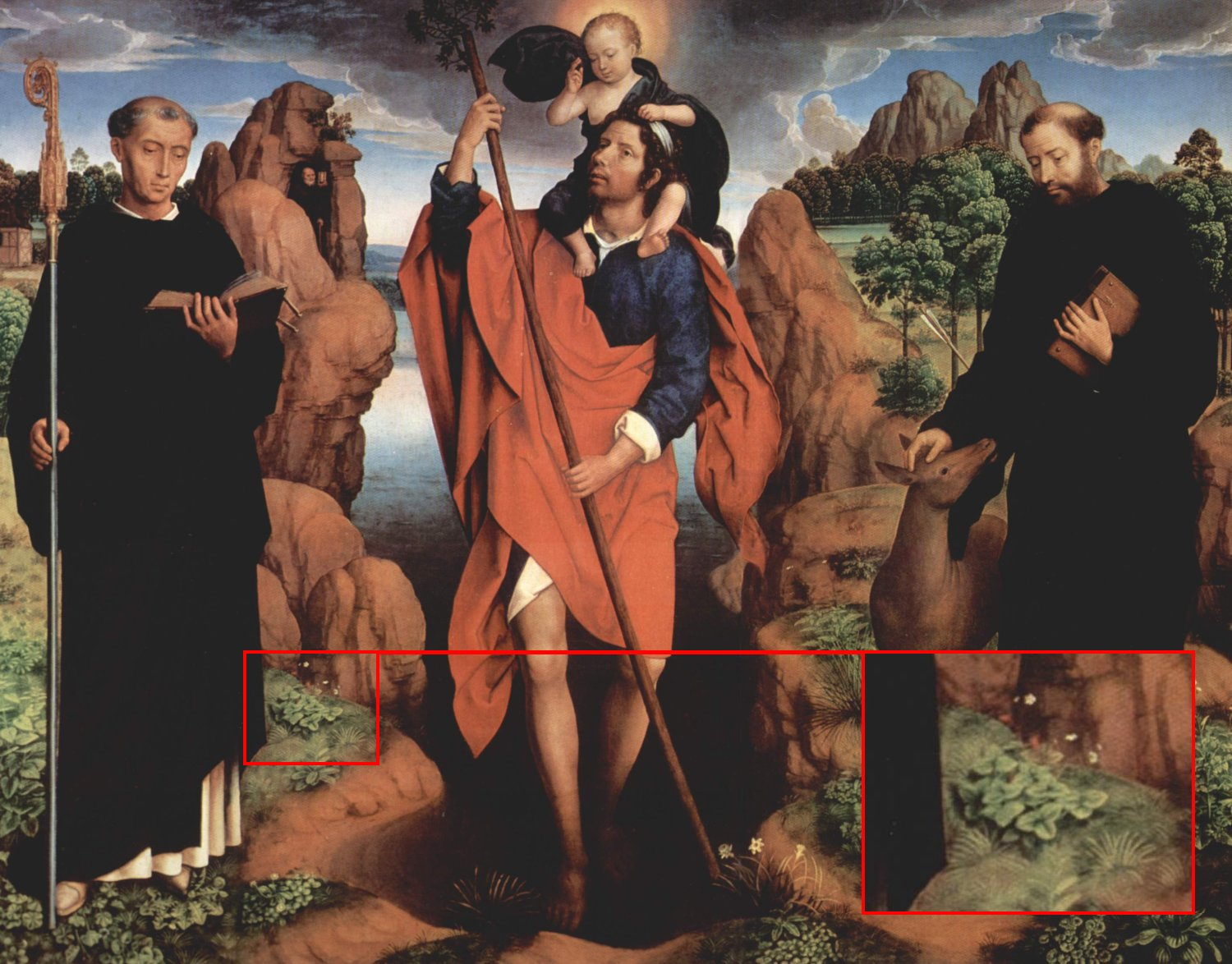 Ausschnittvergrößerung aus Bild:Hans Memling 070.jpg